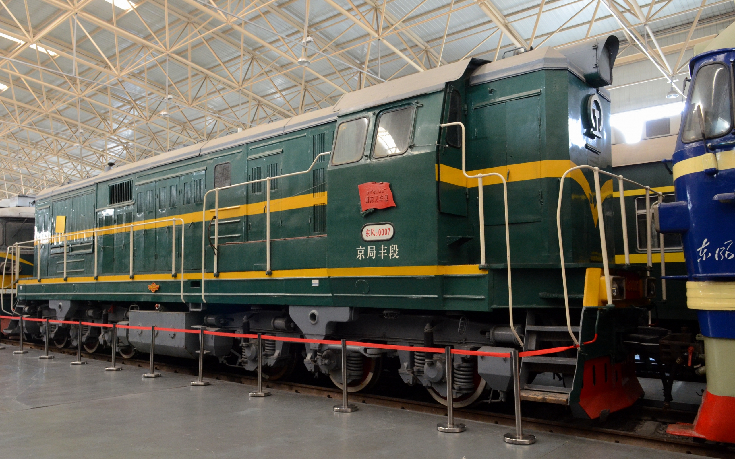 配属北京铁路局丰台机务段的东风5型0007号车保存在中国铁道博物馆